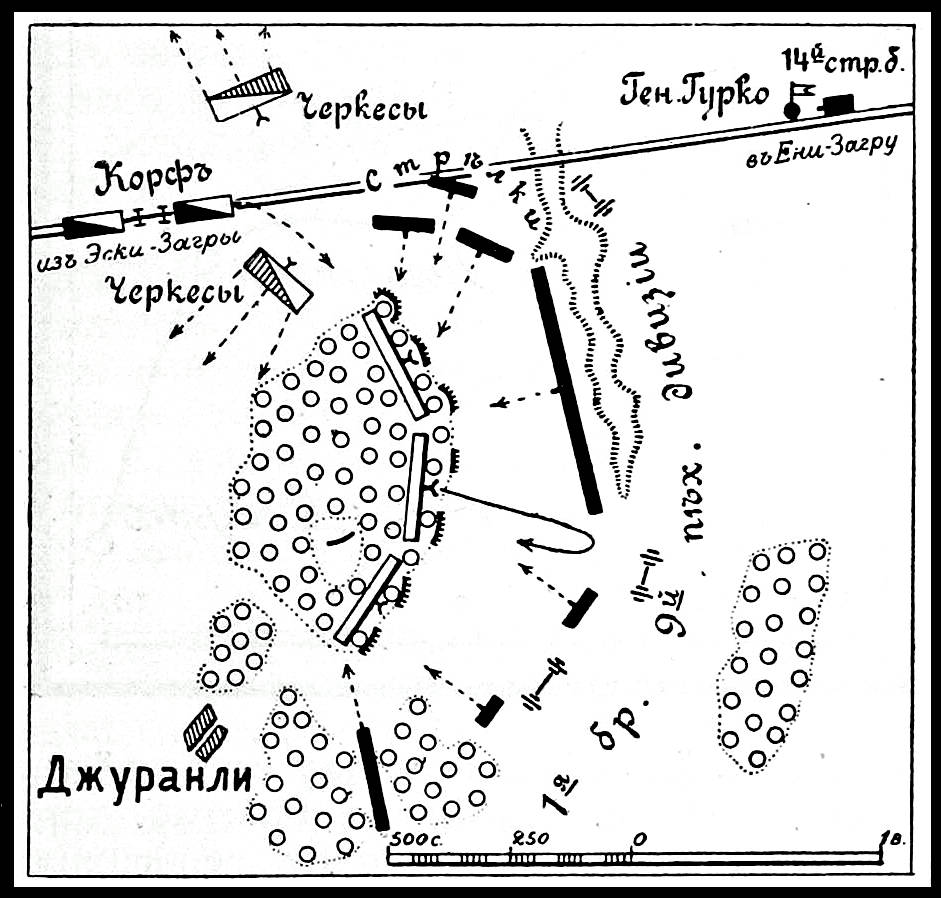 Сражение при Джуранлы. Это изображение было использовано для иллюстрирования статьи «Джуранли (Джуранлы)» опубликованной в девятом томе «Военной энциклопедии», который был издан книгоиздательским товариществом И. Д. Сытина в 1912 году в столице Российской империи городе Санкт-Петербурге.